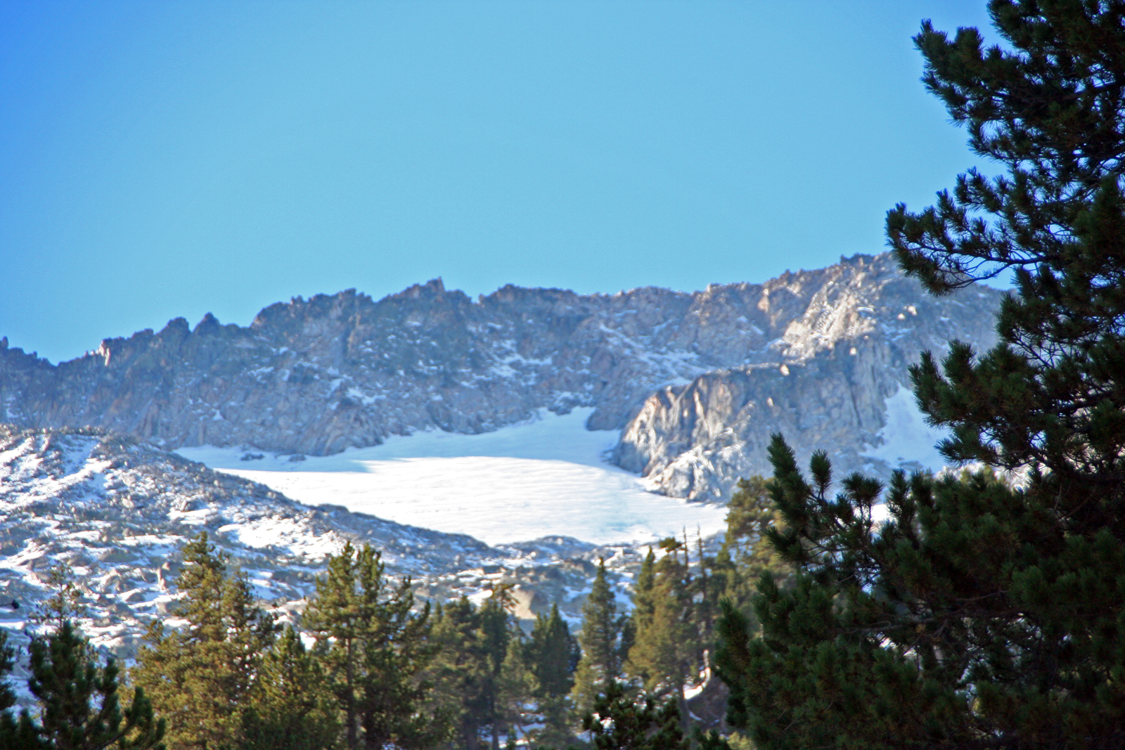 Pinar a los pies del macizo de la maladeta.